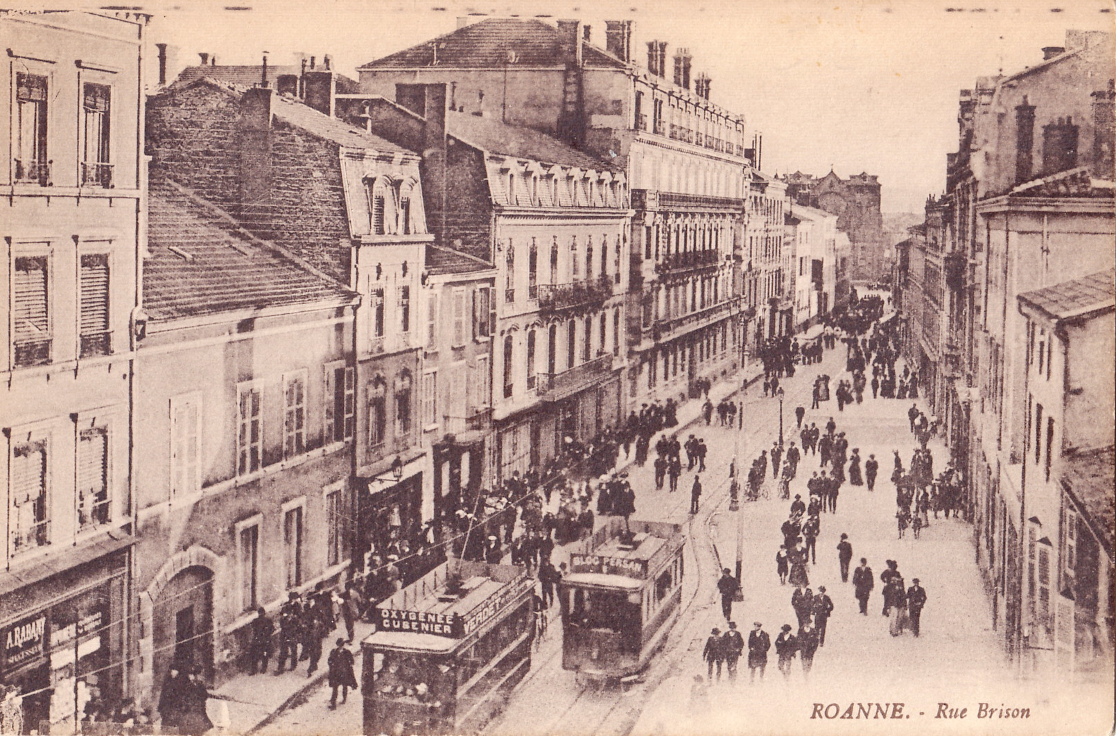 Carte postale ancienne éditée par Prieur : ROANNE - Rue Brison